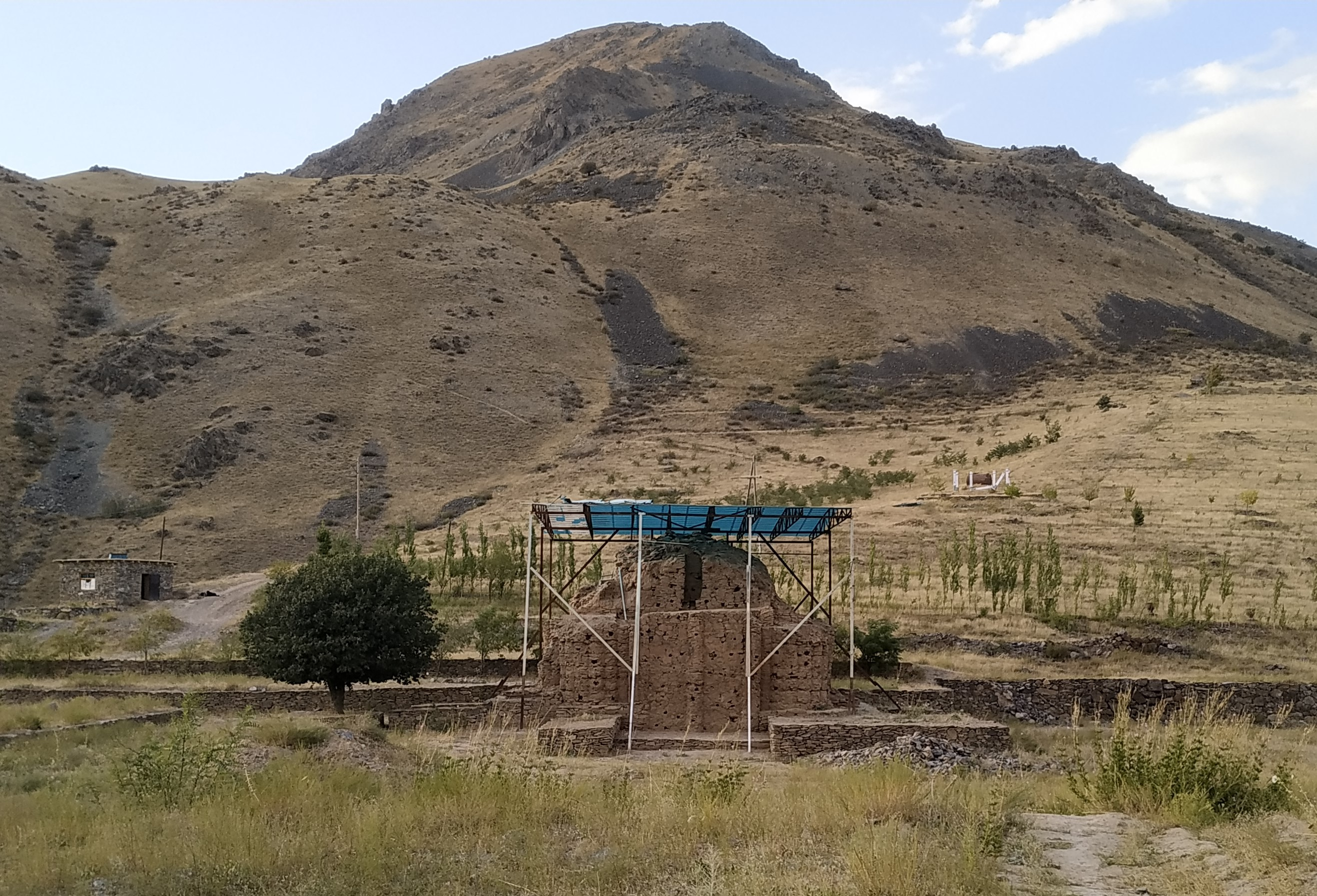 آتشکدۀ کران در تاجیکستان